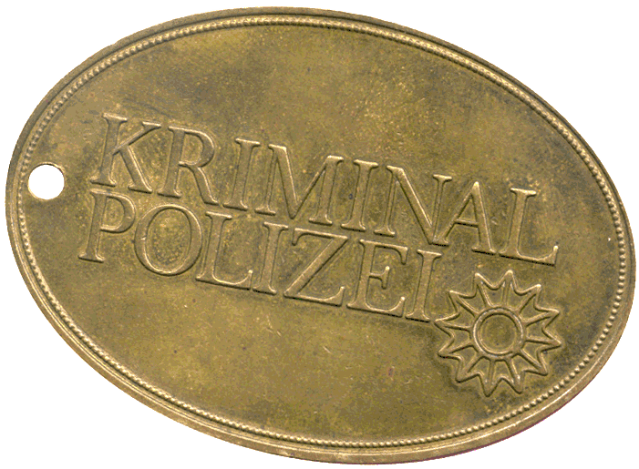 Marke der Kriminalpolizei